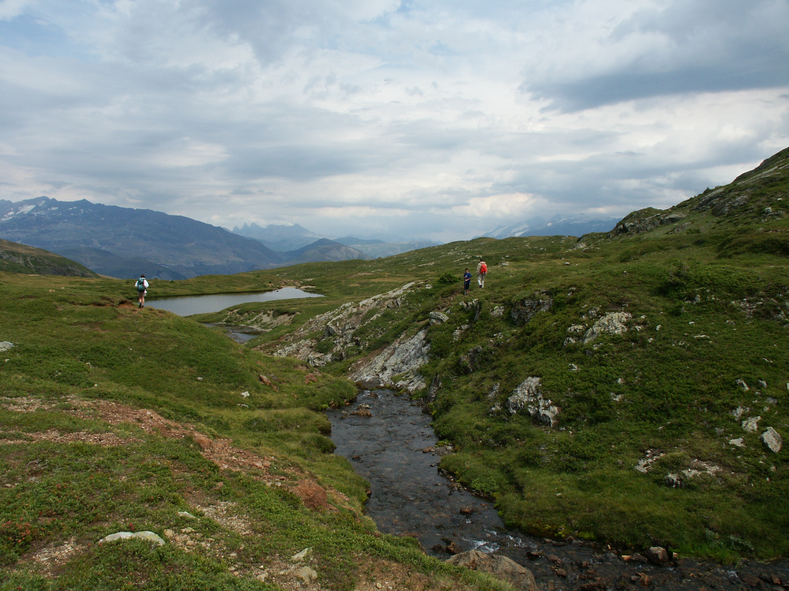 Promeneurs au lac fourchu